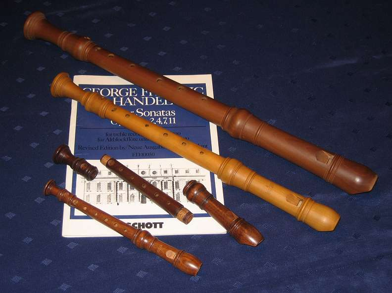 Verschiedene Blockflöten. Von oben nach unten: Tenor in c', Apfelbaumholz Alt in f', Maracaibo-Buchs Sopran in c", Palisander (im Ganzen) Sopranino in f", Palisander